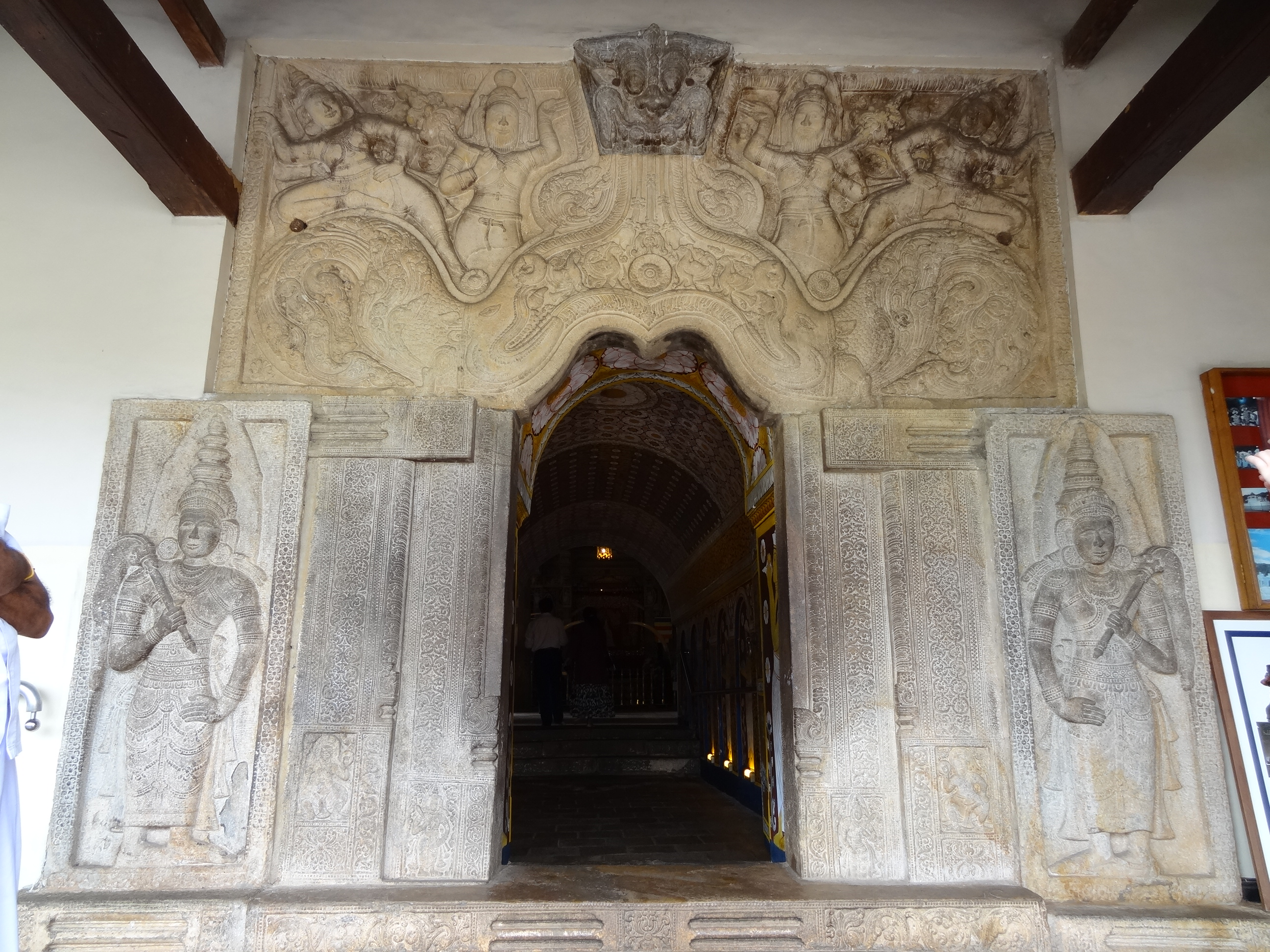 Sri Dalada Maligawa